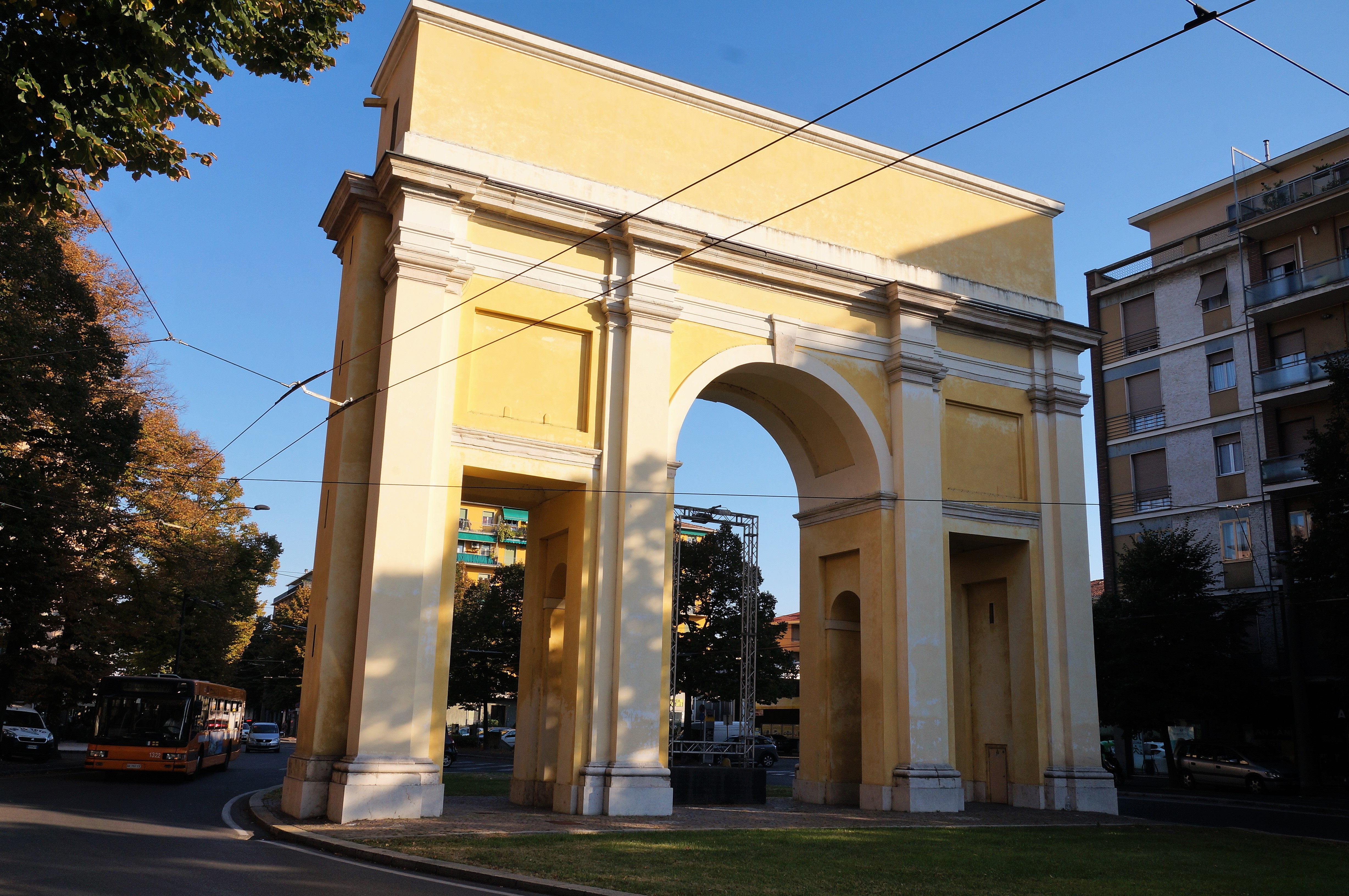 arco di San Lazzaro This is a photo of a monument which is part of cultural heritage of Italy.